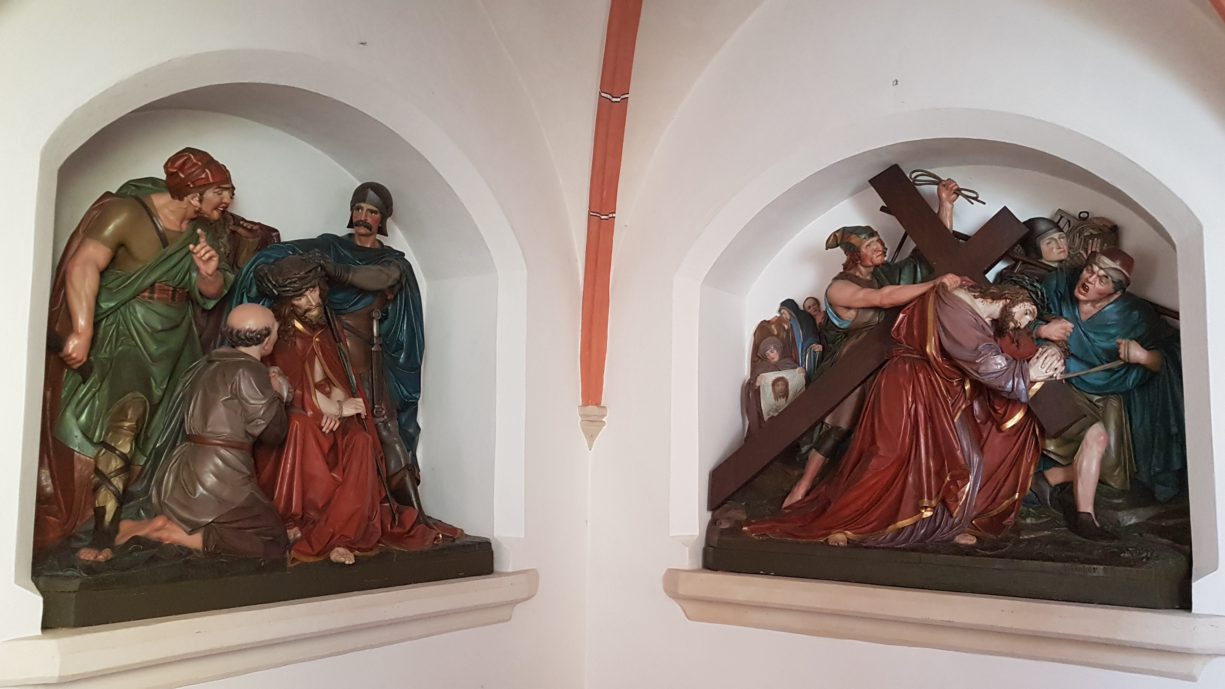 Augustiner-Chorherrenstift Altötting